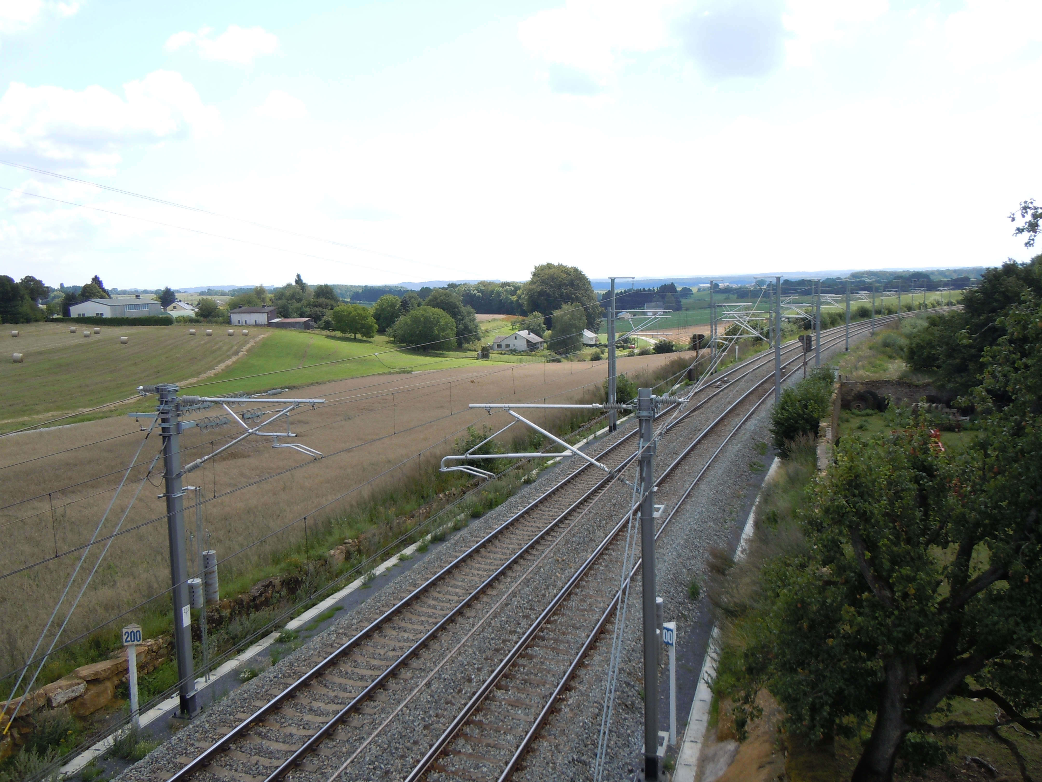 Le hameau belge de Stehnen vu du nord-ouest